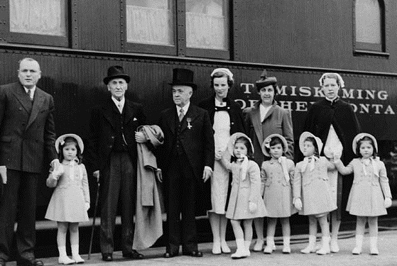 Dionne quintuplets, parents, nurses, and guardian